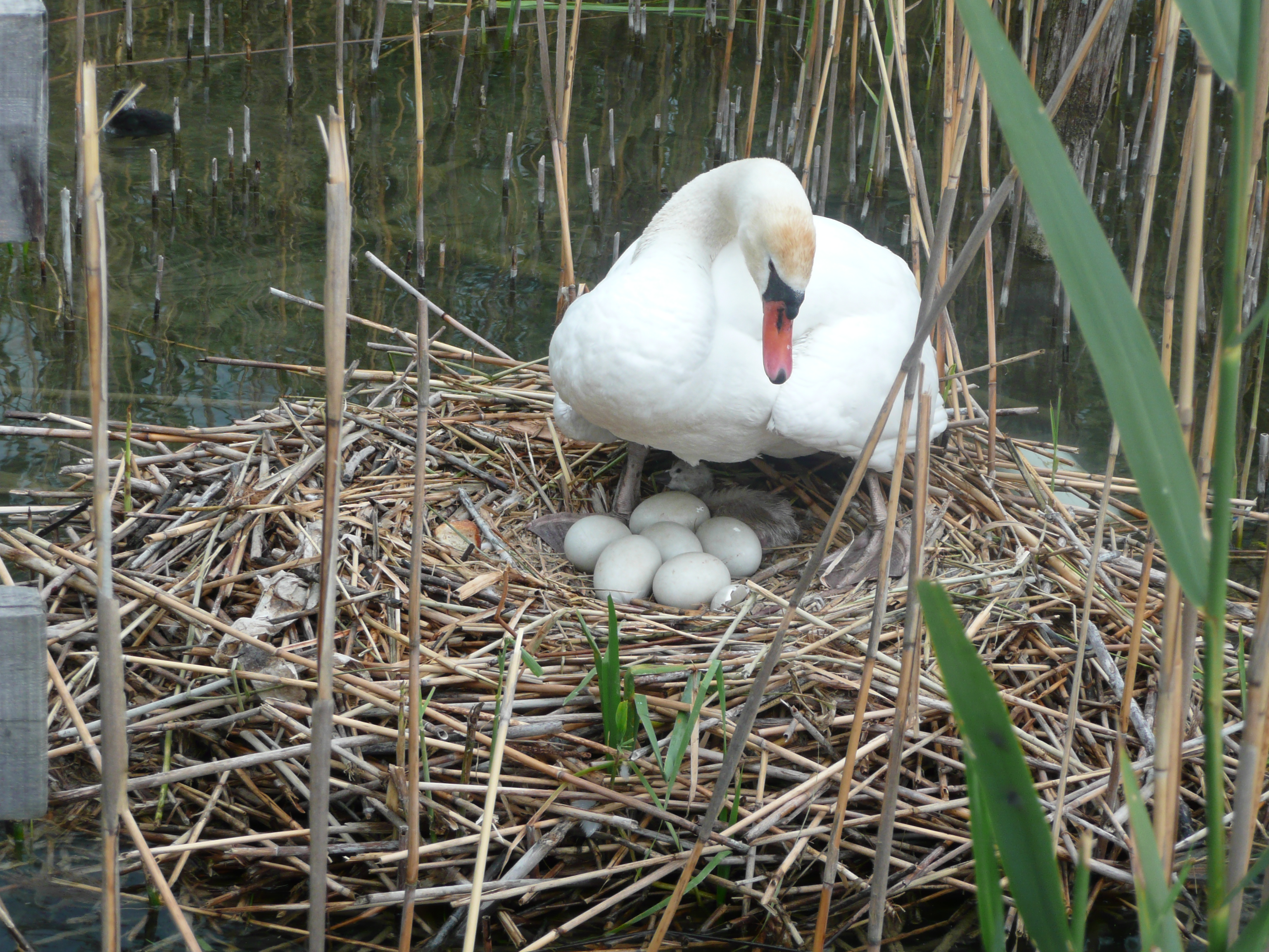 Jeune cygne à peine sorti de l'oeuf sous sa mère.